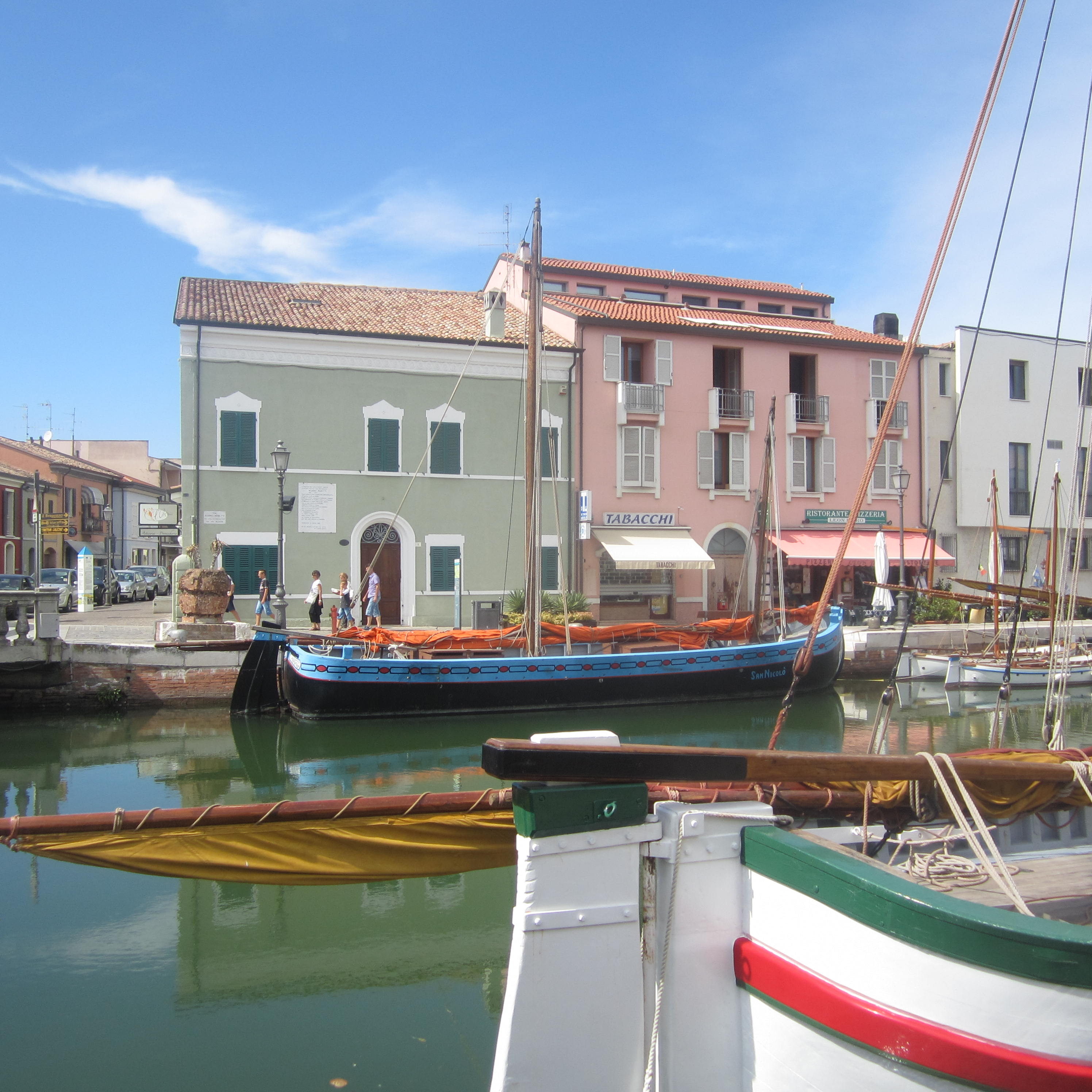 Casa museo "Marino Moretti" This is a photo of a monument which is part of cultural heritage of Italy.